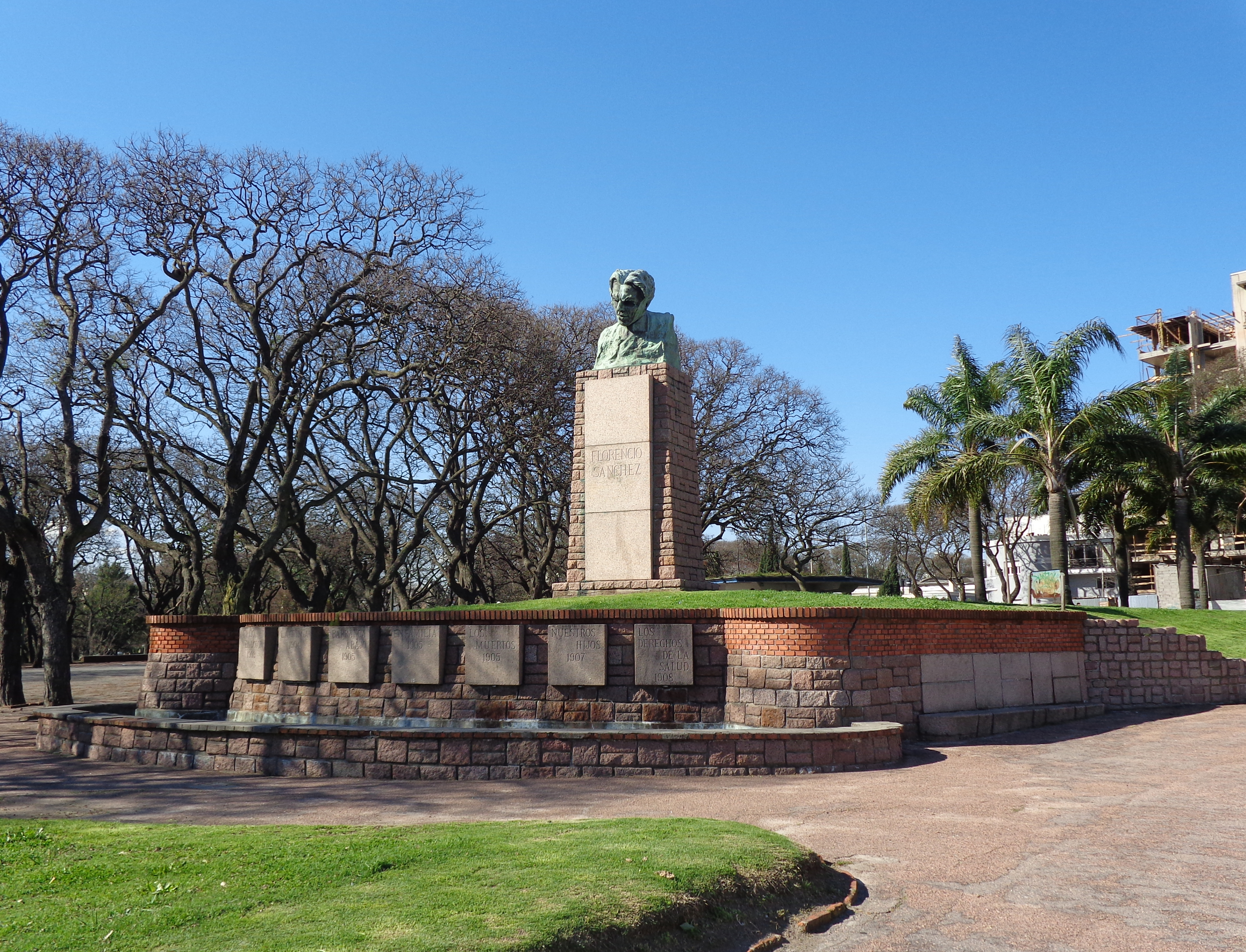 Florencio Sánchez. Ubicada en el departamento de Montevideo